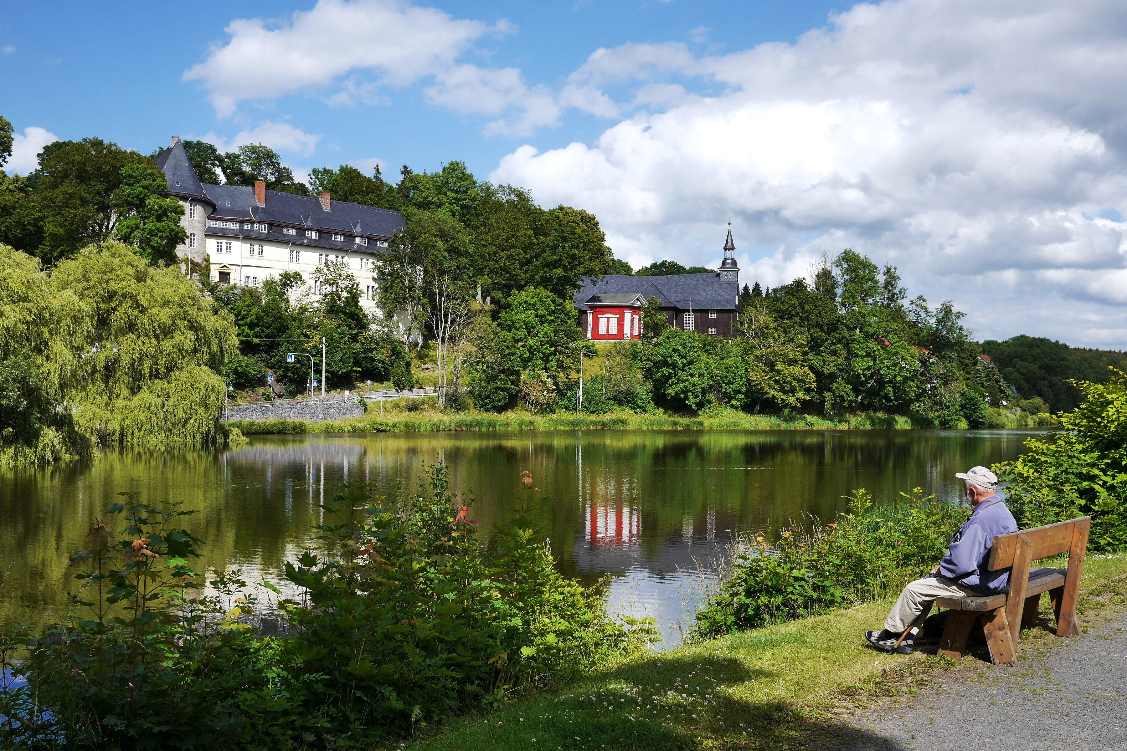 Schloss und Kirche von Stiege (Harz) am Unteren Teich